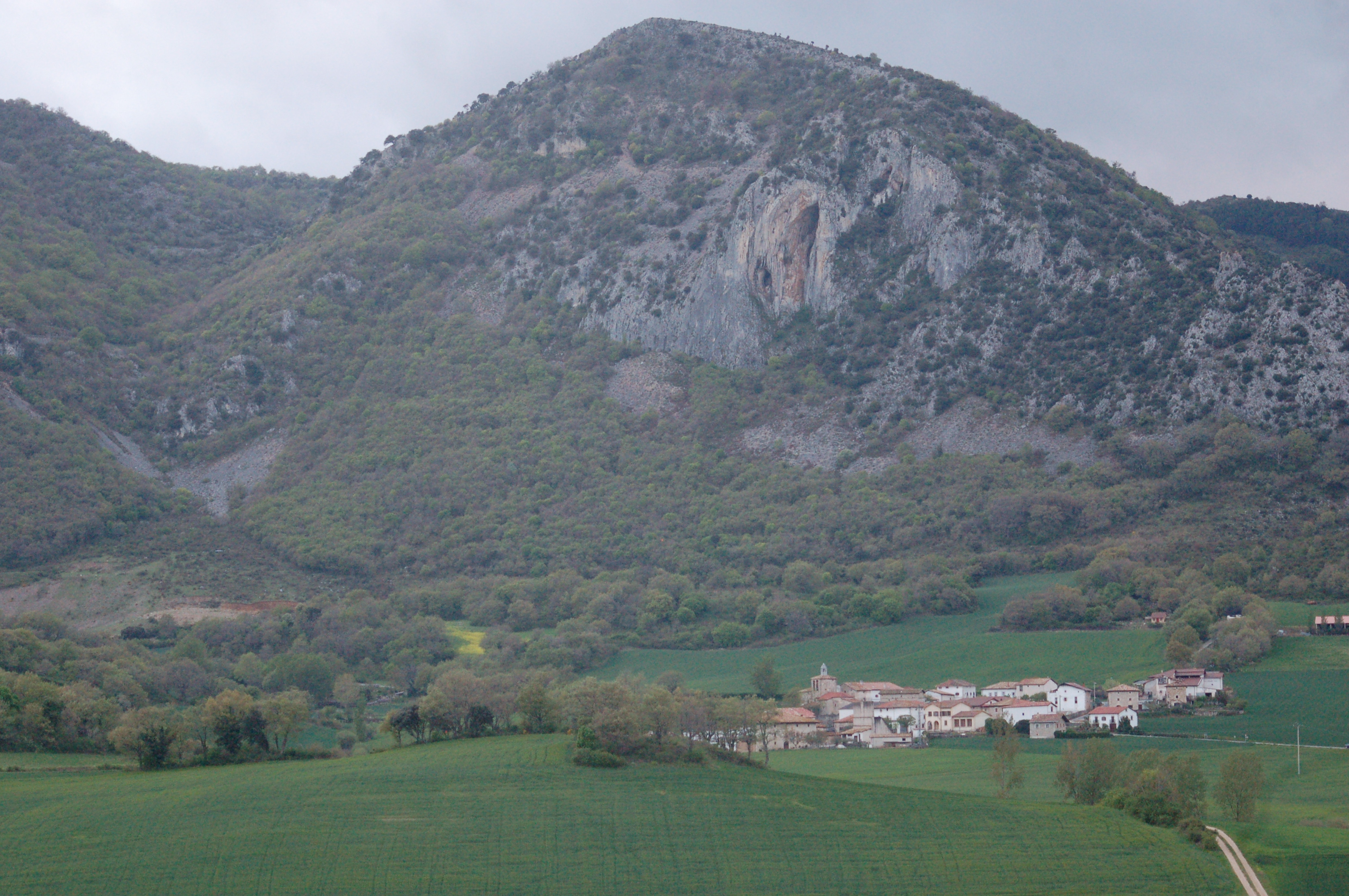 Goñerriko Azantzaren ikuspegia.